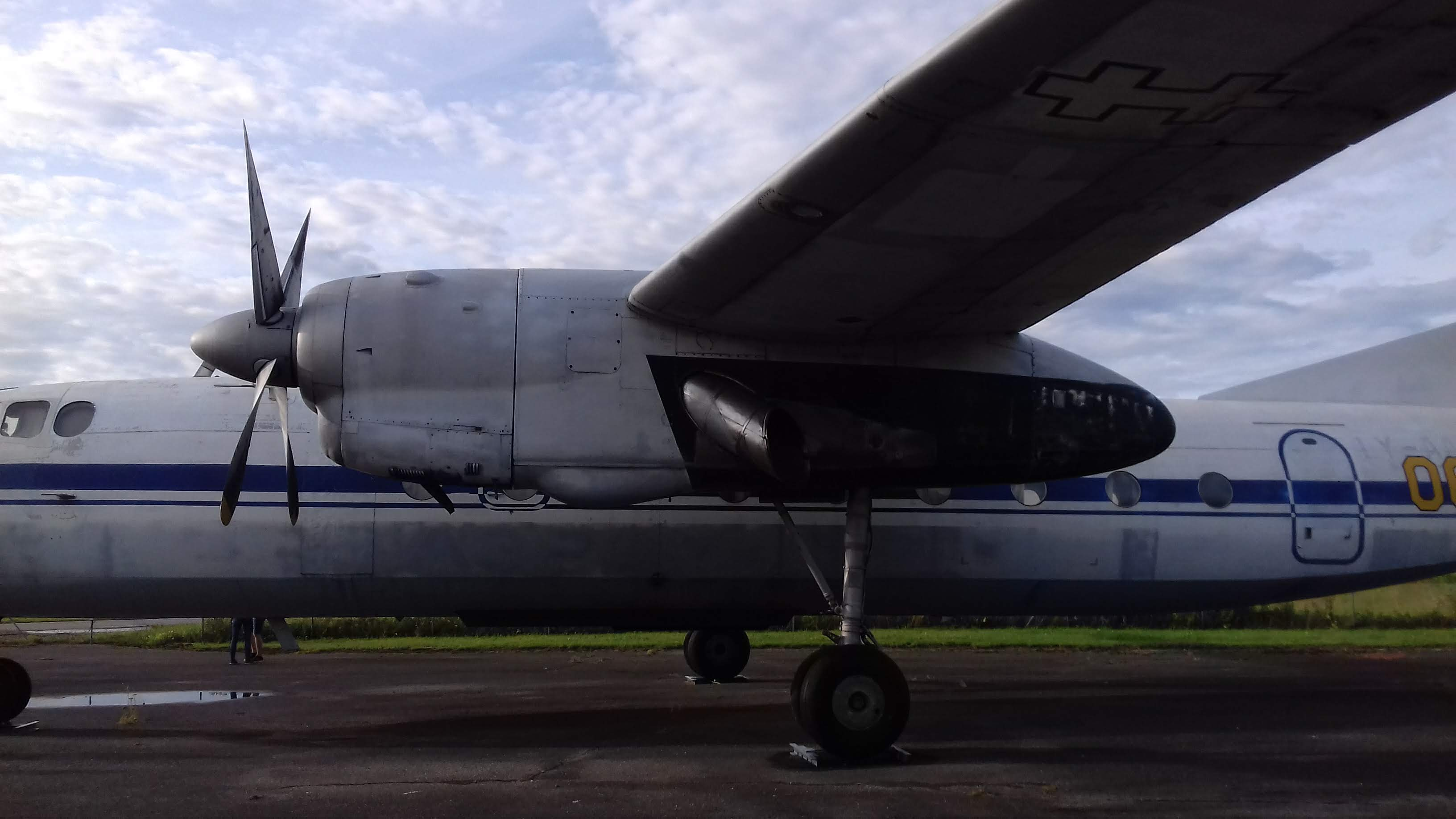 Данный экземпляр совершил певый полёт 26 июля 1968 года. Это был первый Ан-26, эксплуатируемый в Литовском УГА, в 1991 году перешёл авиакомпании "Литовские авиалинии", а в 1994 году - в ВВС Литвы. В последнем эксплуатировался до 1996 года, затем переехал в Каунасский Музей Авиации.